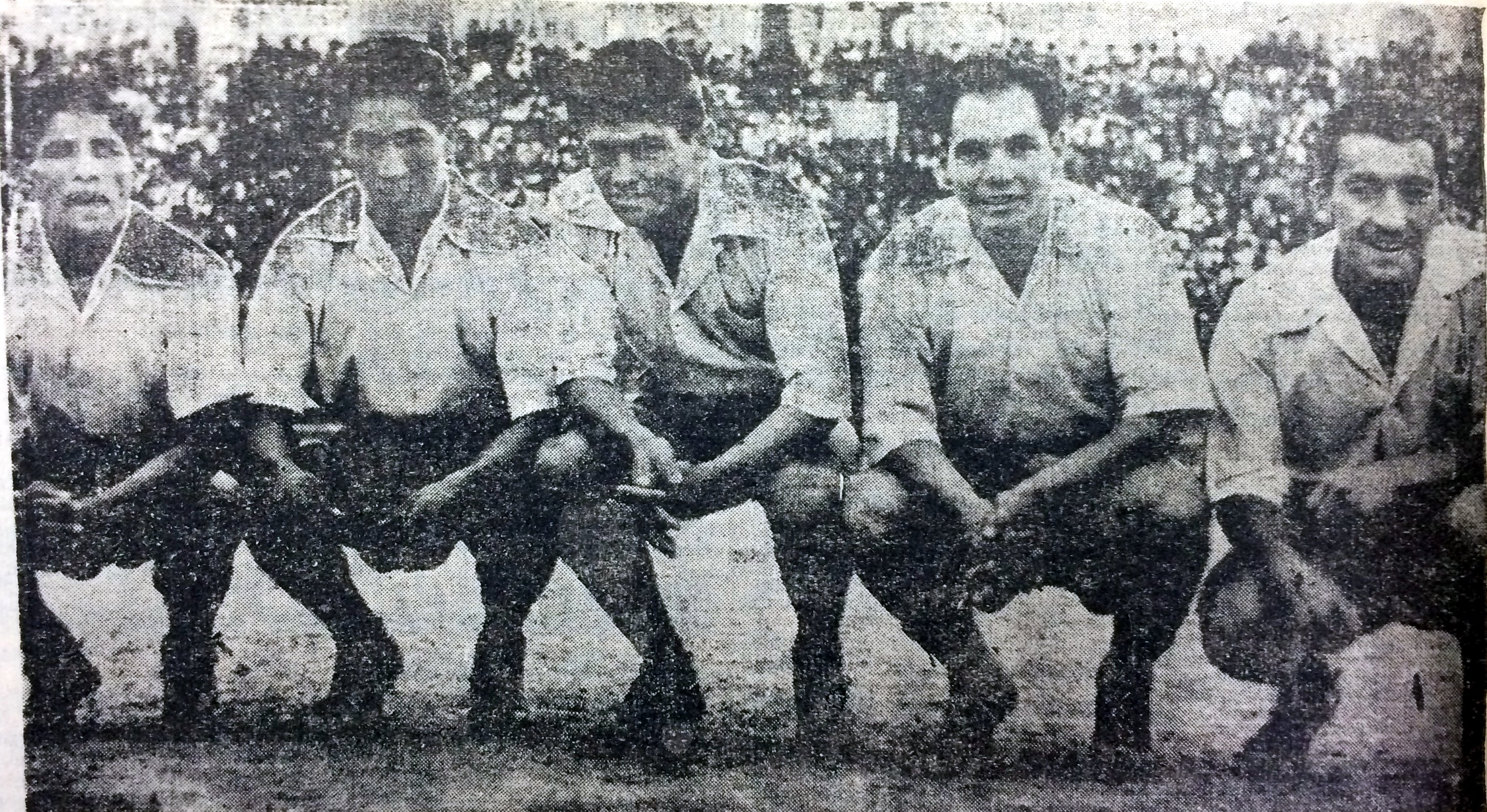 Lo que antiguamente se conocía como "Vanguardia" del equipo campeon del campeonato profesional de 1953, a saber como Wing Izquierdo Montoya, como Insider izquierdo Victor Ugarte, como Centro Forward Albornoz, como Insider derecho Mario Mena y como Wing Derecho Mario Vargas.